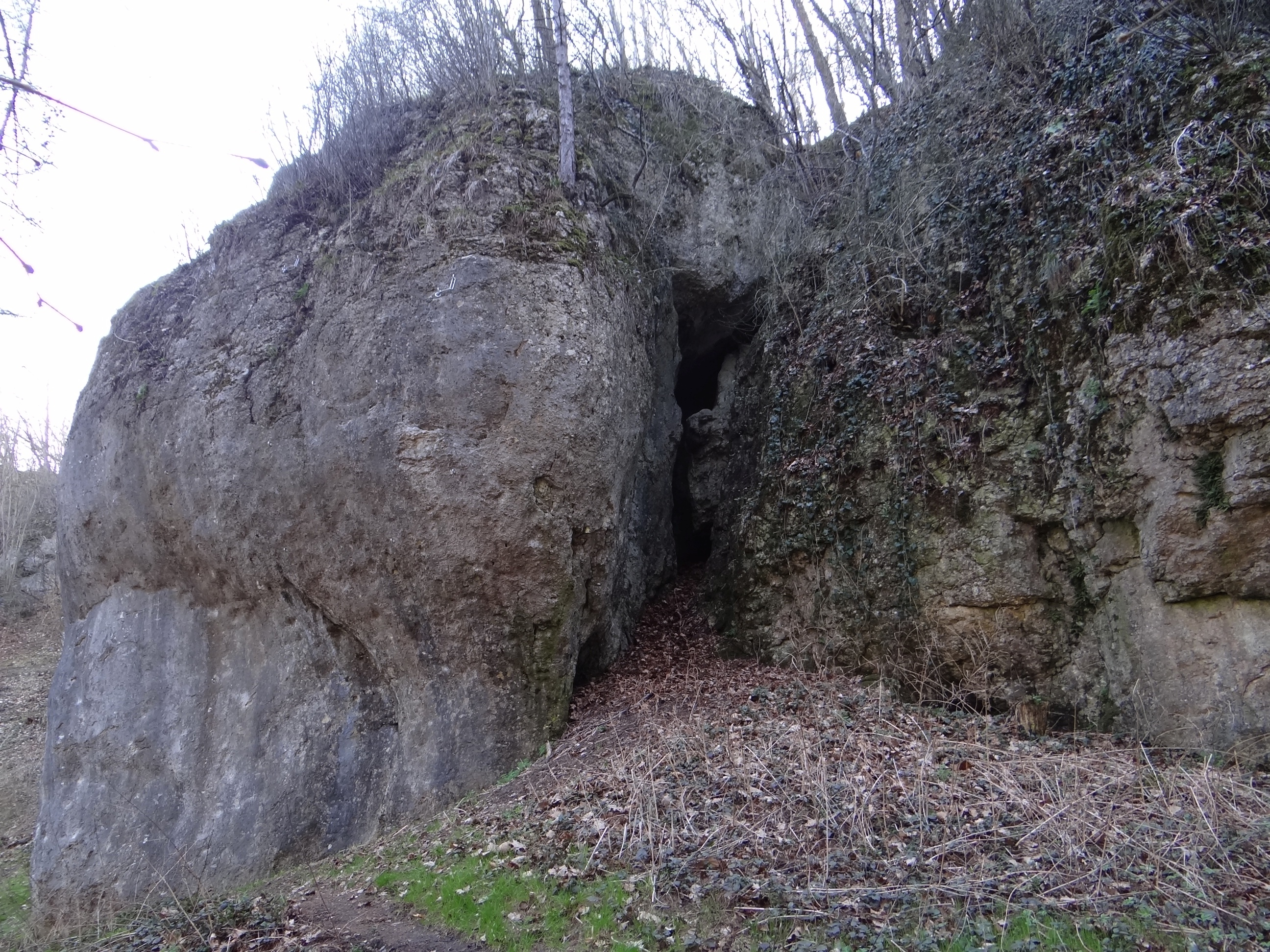 Skała Obchodnia w Dolinie Brzoskwinki